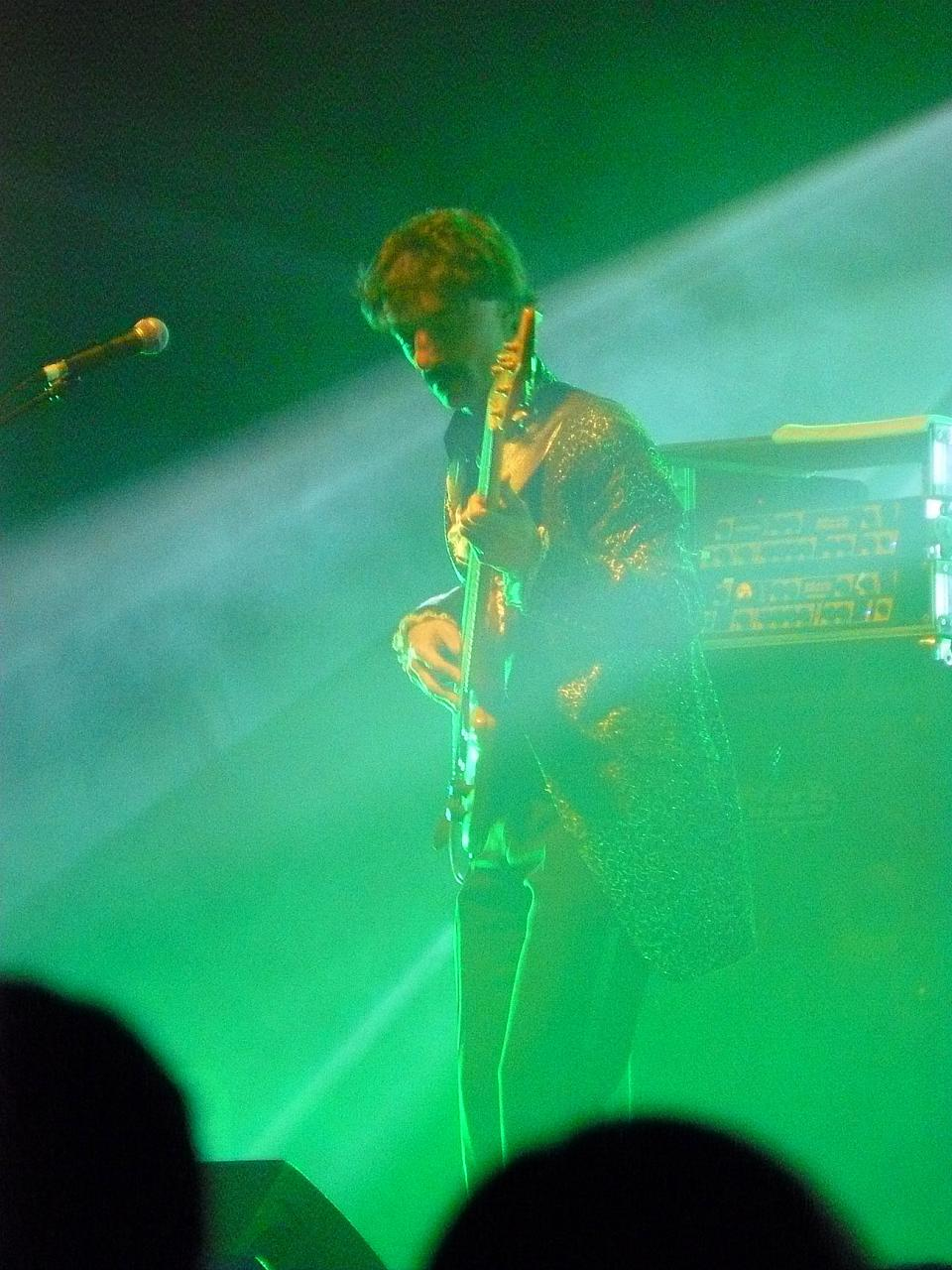 Faso. Lumbaart: El Faso.